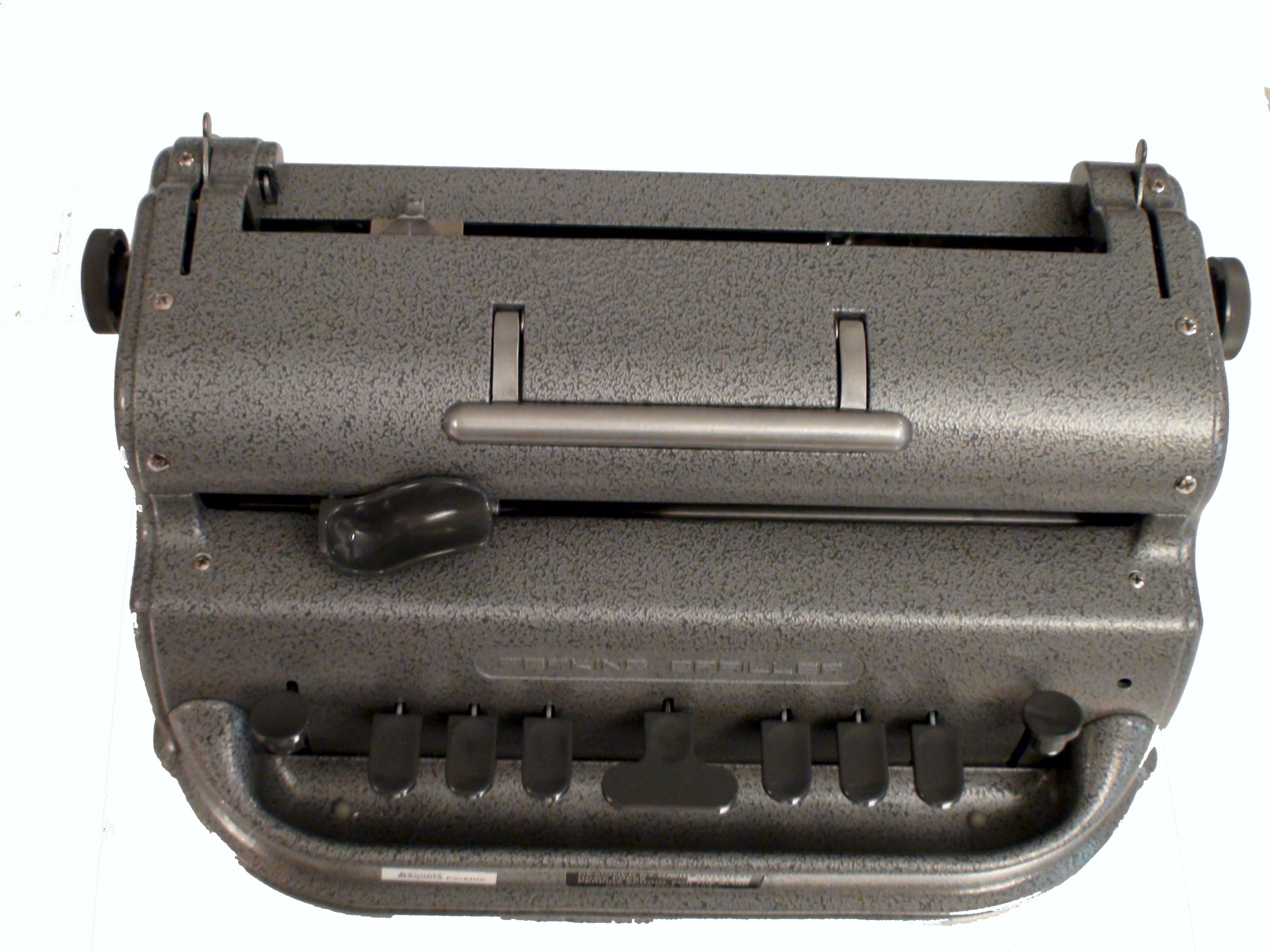 Máquina de escribir Perkins.